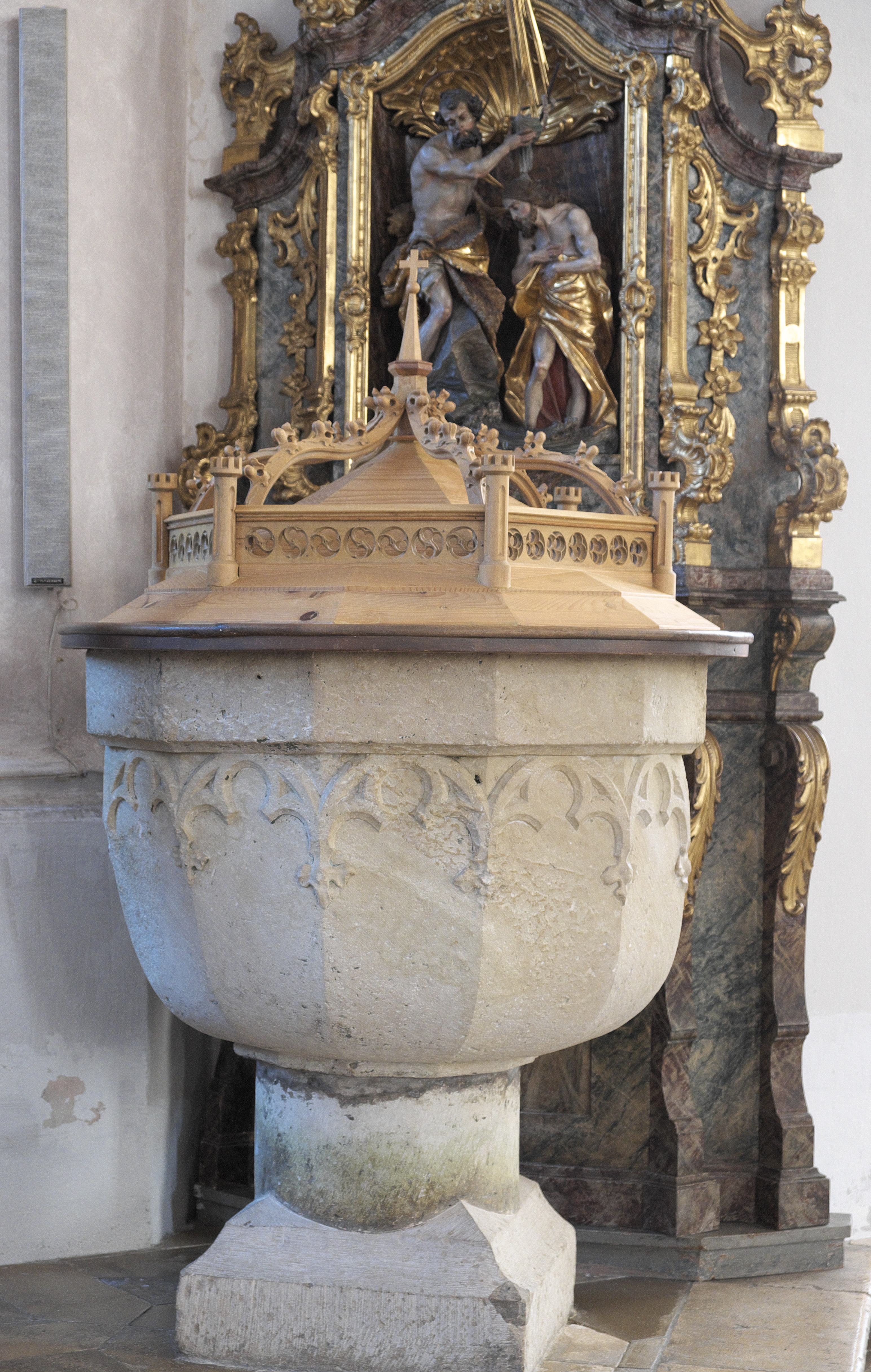 Katholische Stadtpfarrkirche Mariä Himmelfahrt in Höchstädt im Landkreis Dillingen an der Donau (Bayern), Taufbecken mit Kleeblattbogenfries, frühes 15. Jahrhundert